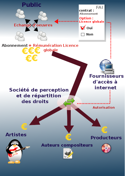 fonctionnement de la licence globale